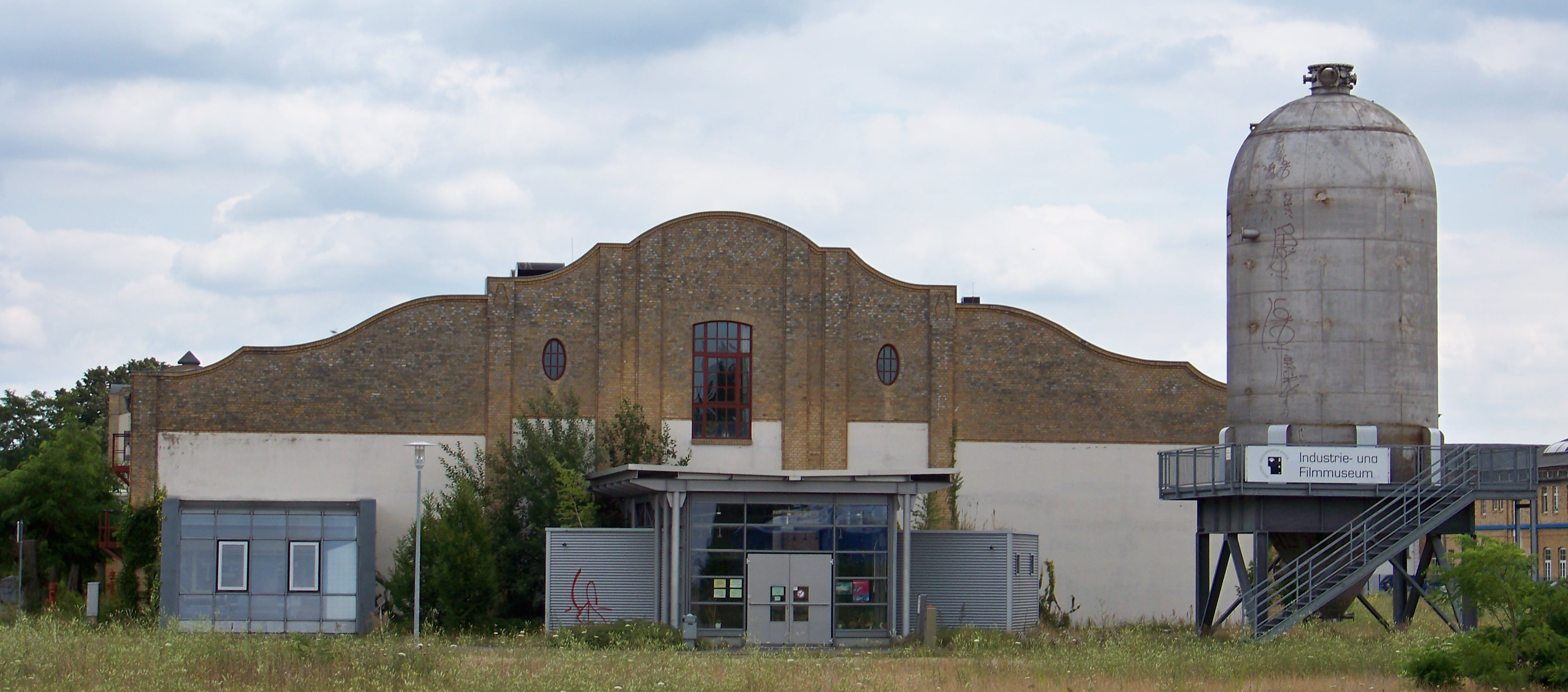 Industrie- und Filmmuseum in der Bunsenstraße in Wolfen